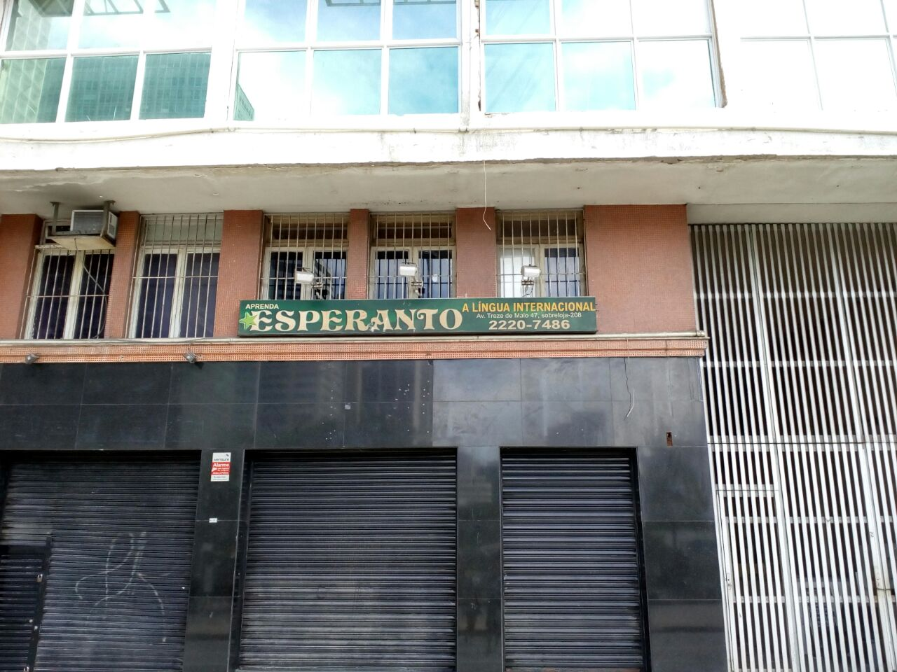 Sidejo de la Kultura Kooperativo de Esperantistoj